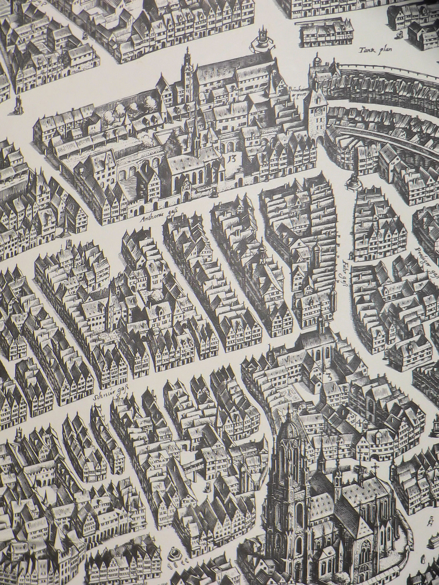 Frankfurt am Main, Kupferstich von Matthäus Merian, 1628. Der Ausschnitt zeigt die nördliche Altstadt zwischen Zeil, Töngesgasse und Schnurgasse.